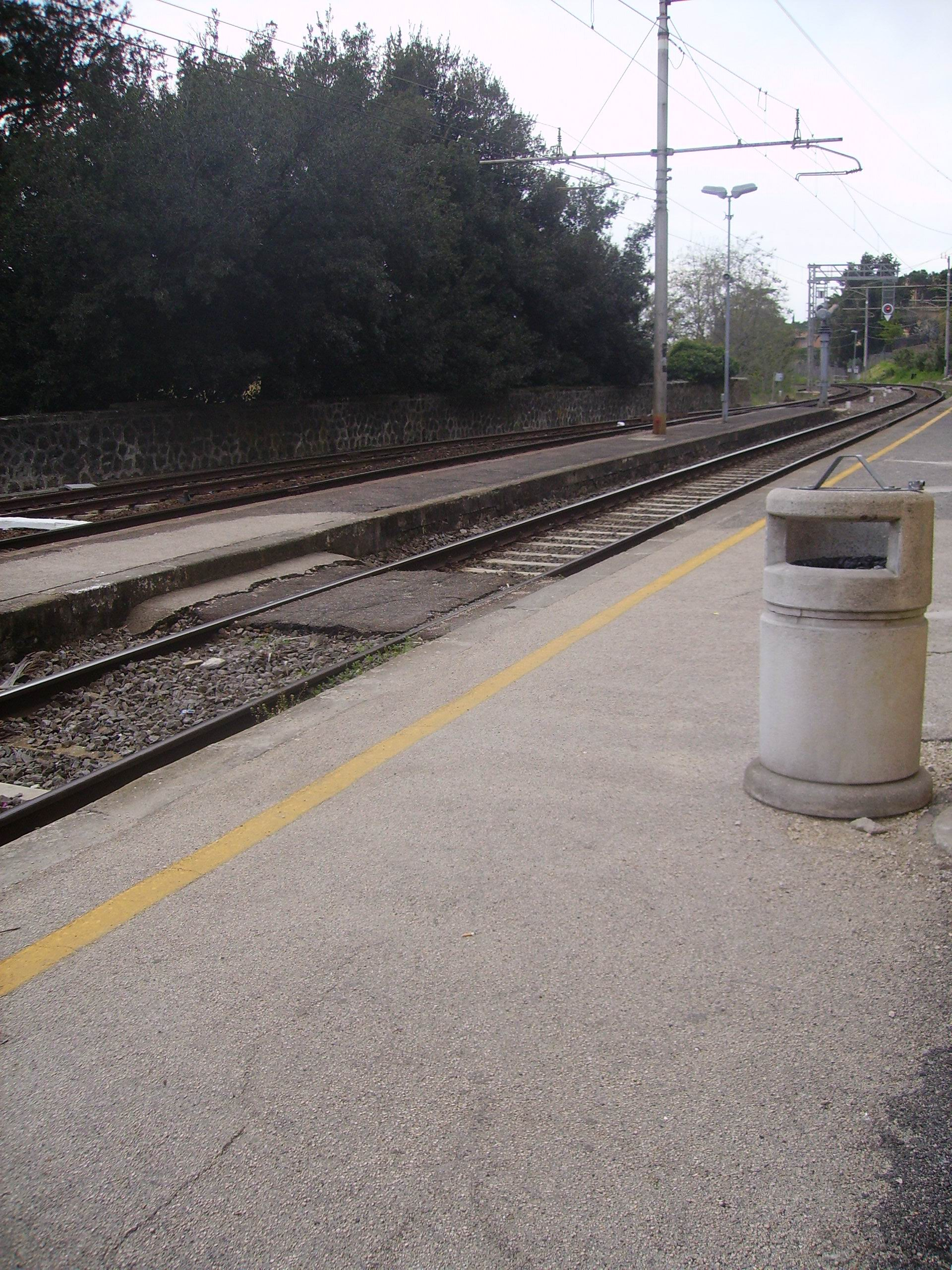 Binari ferroviari a Marino